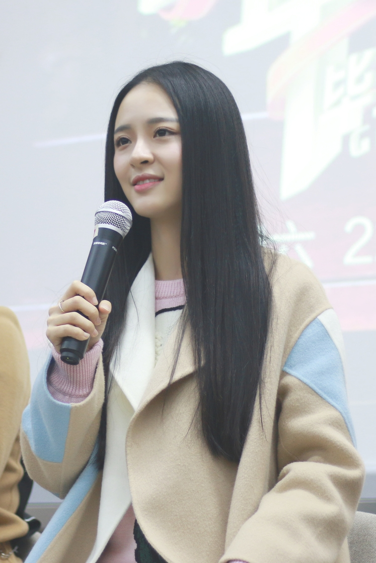 中文（中国大陆）: 李莎旻子在《一年级》看片会上